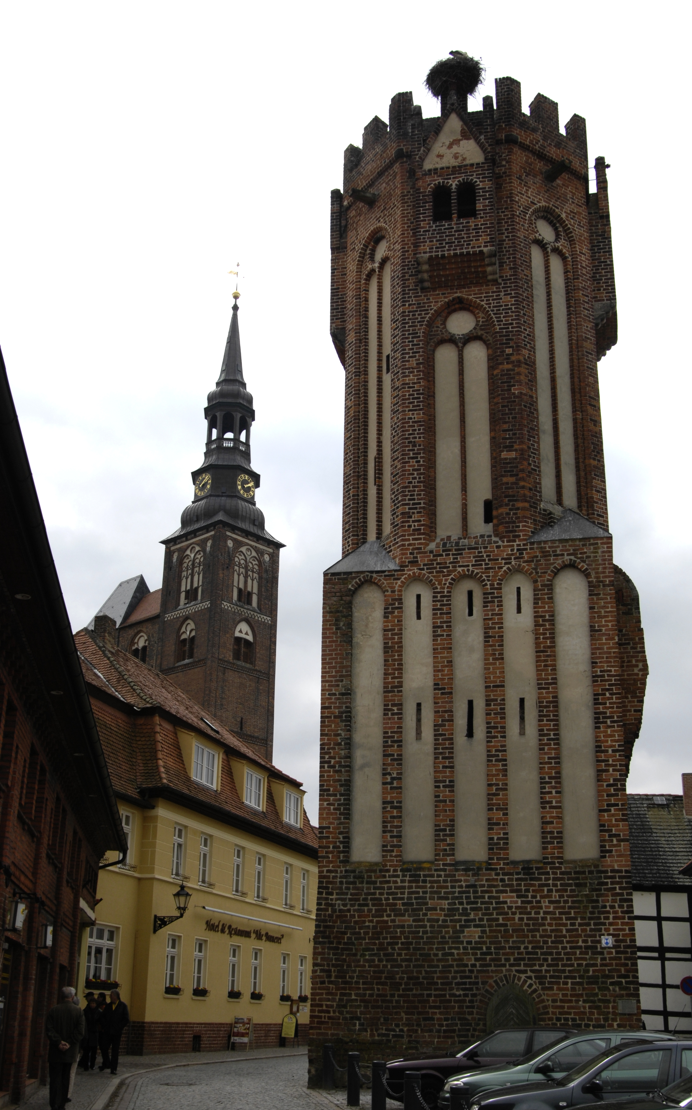 Tangermünde, Türme